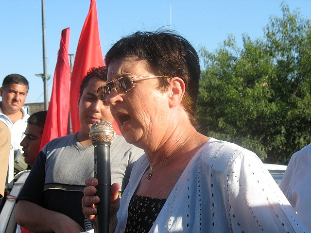 העצרת שקיימה חד"ש ומק"י 08/07/2006 בנצרת. צילום: יואב גולדרינג ואלון לי